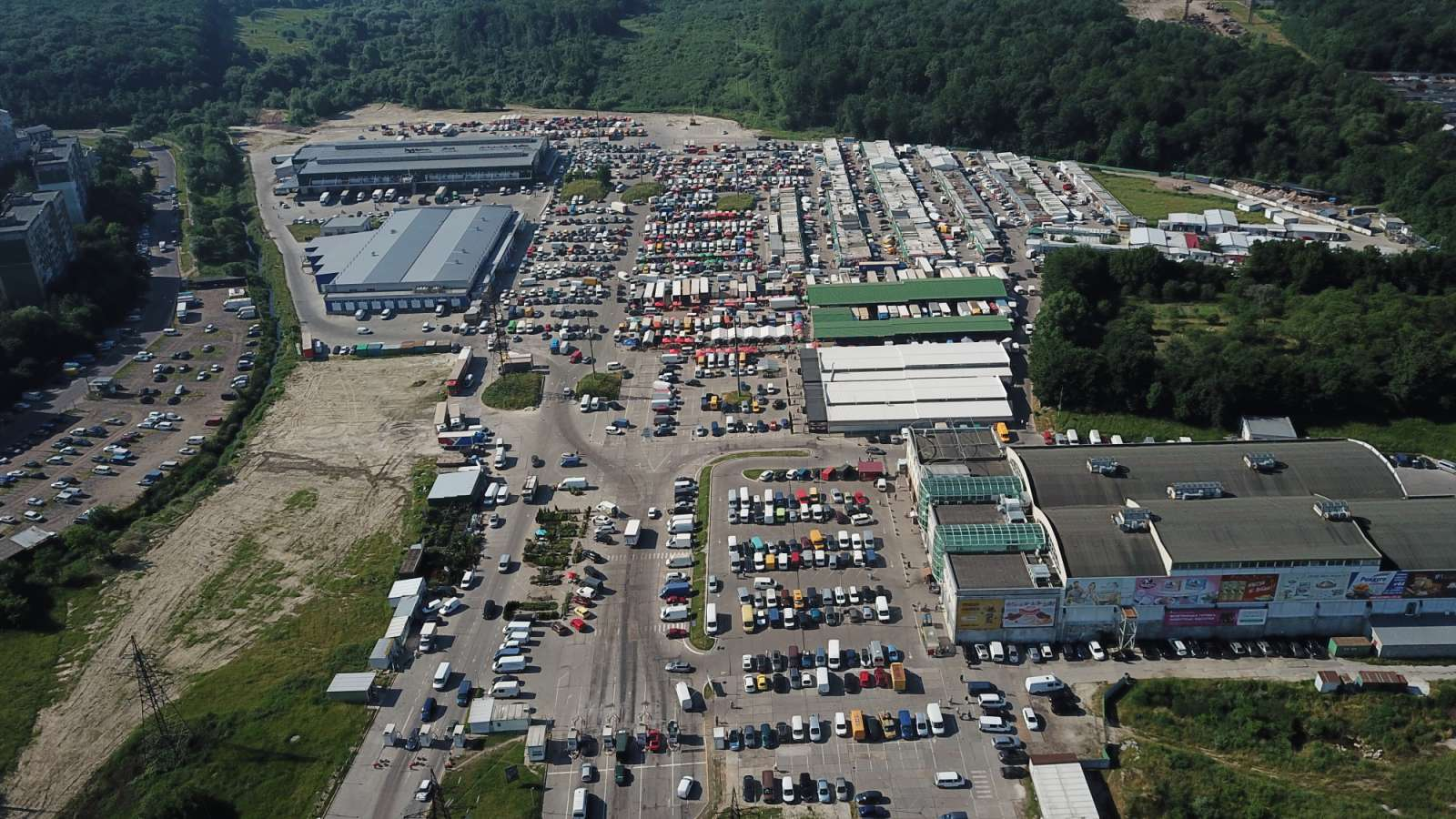 Ринок "Шувар" з висоти пташиного польоту